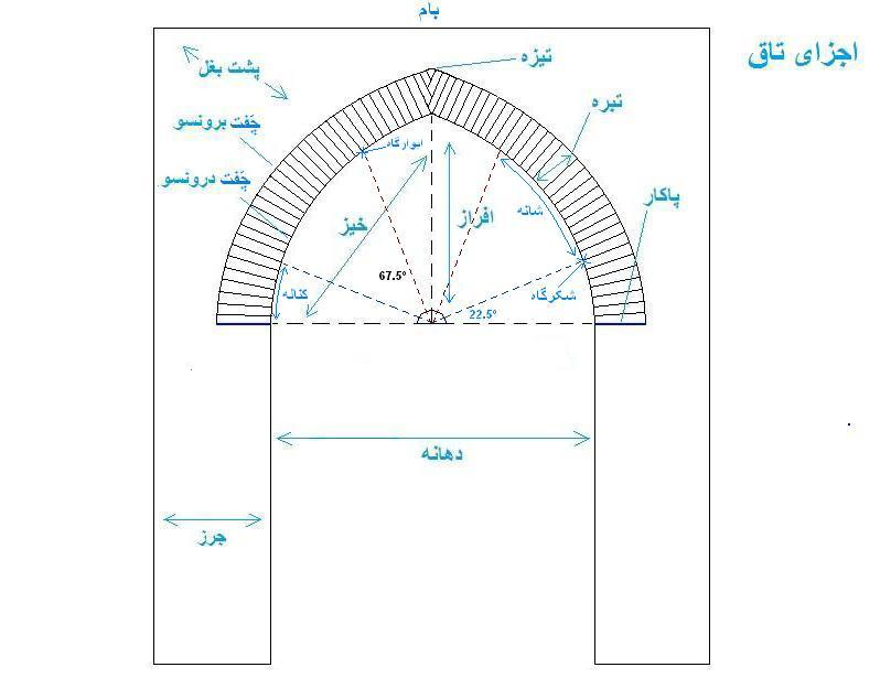 اجزای تاق در این تصویر دیده می شود